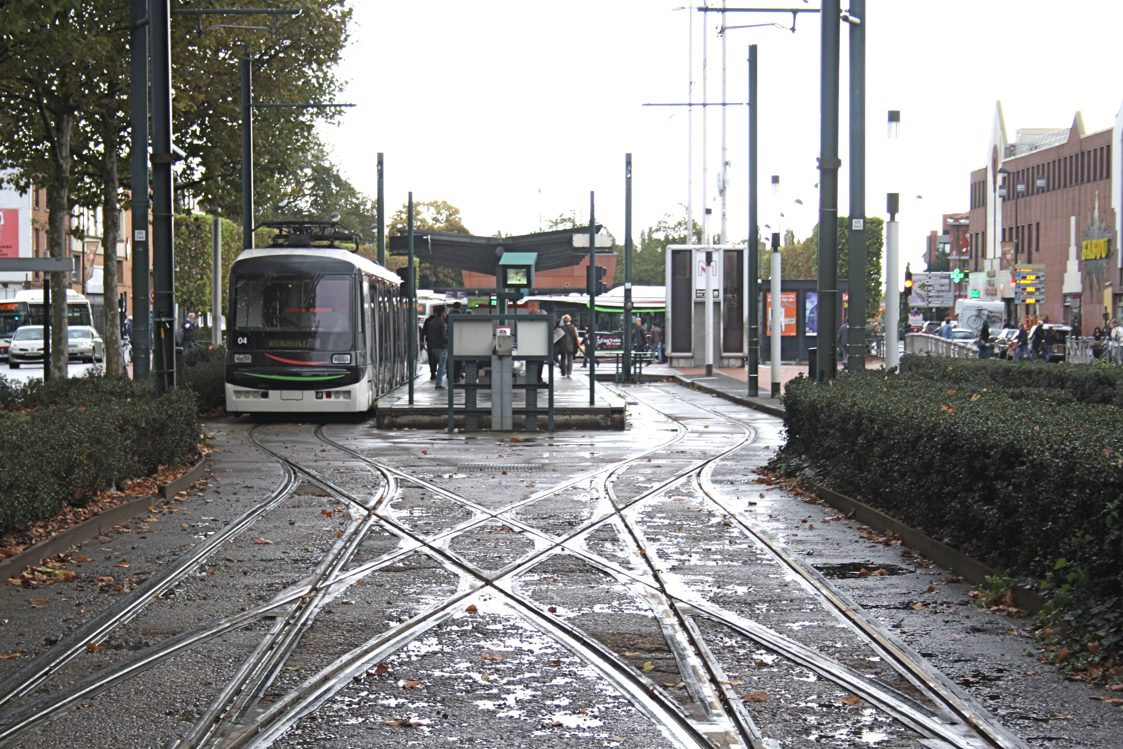 Terminus du Mongy à Roubaix